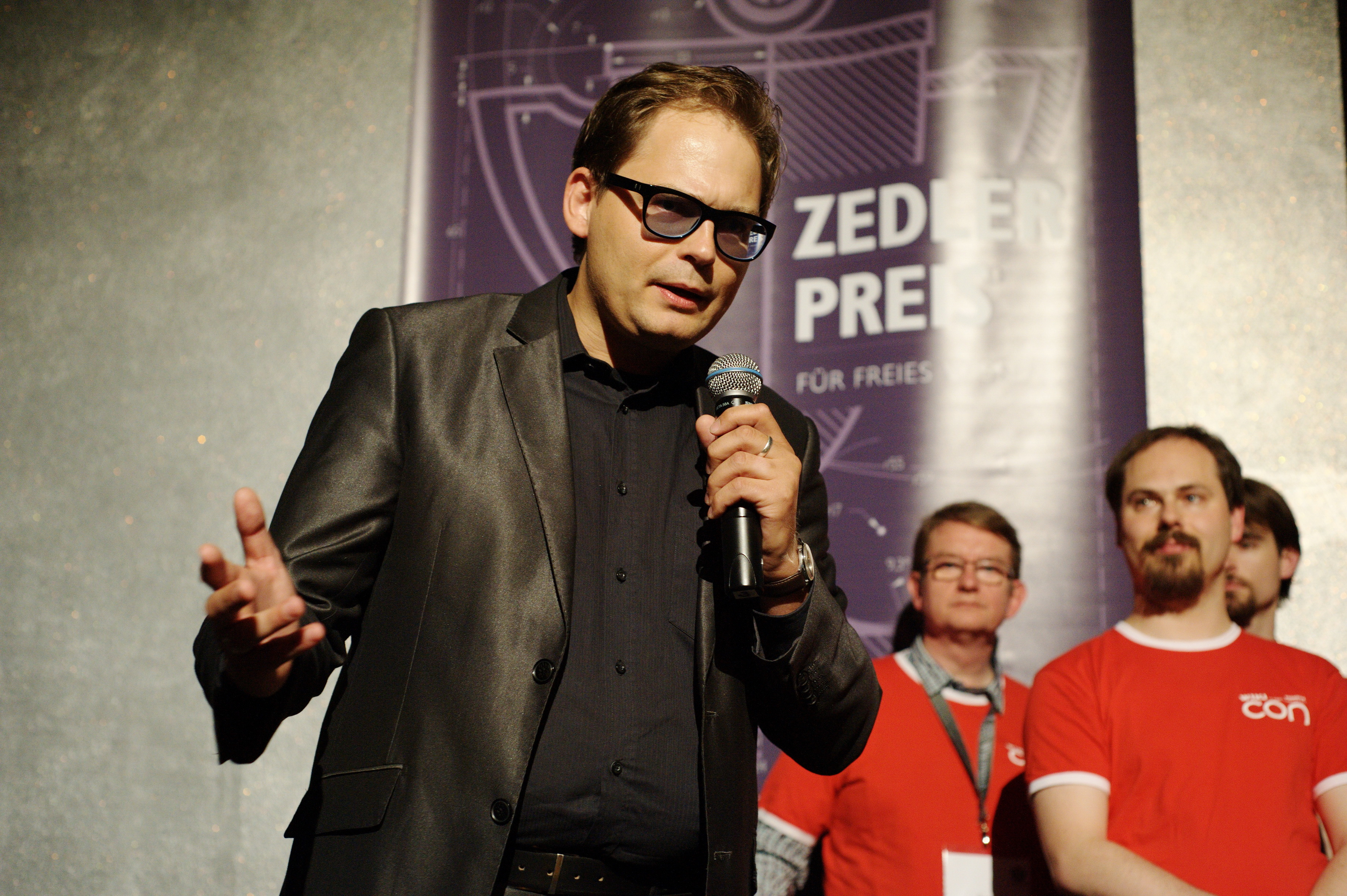 Verleihung Zedler-Preis 2013